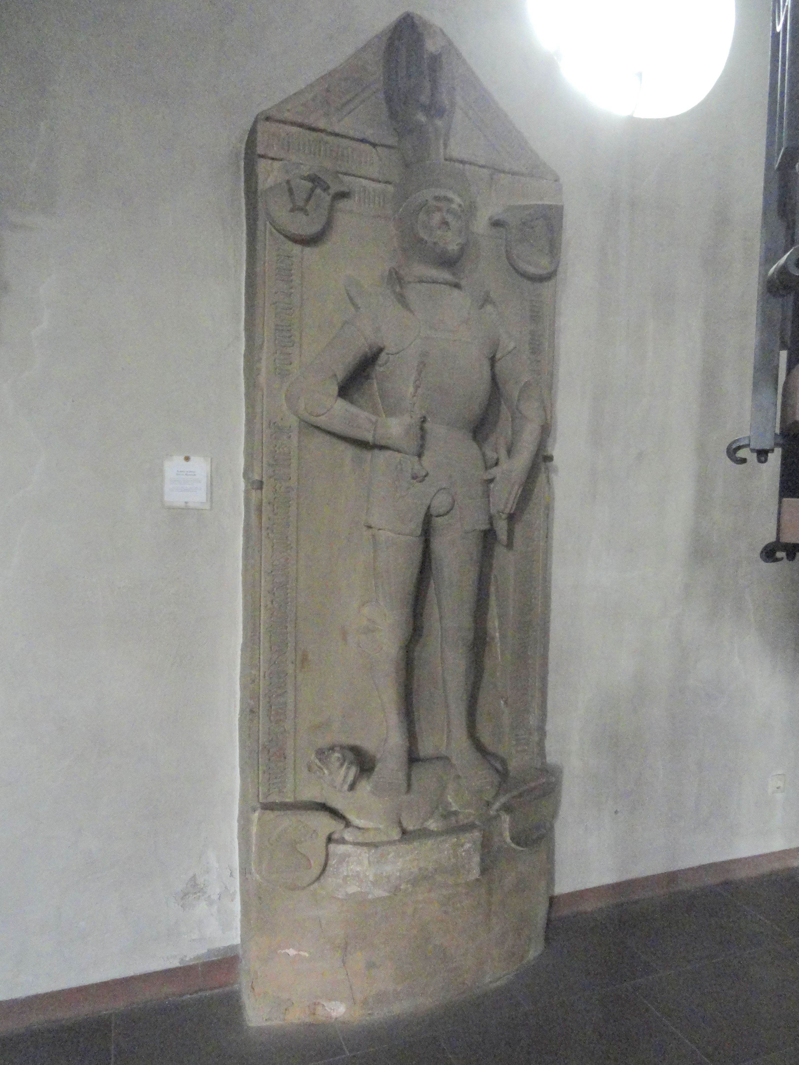 Franziskanerkloster, Würzburg, Germany. Grabmal des Ritters Peter von Randersacker.